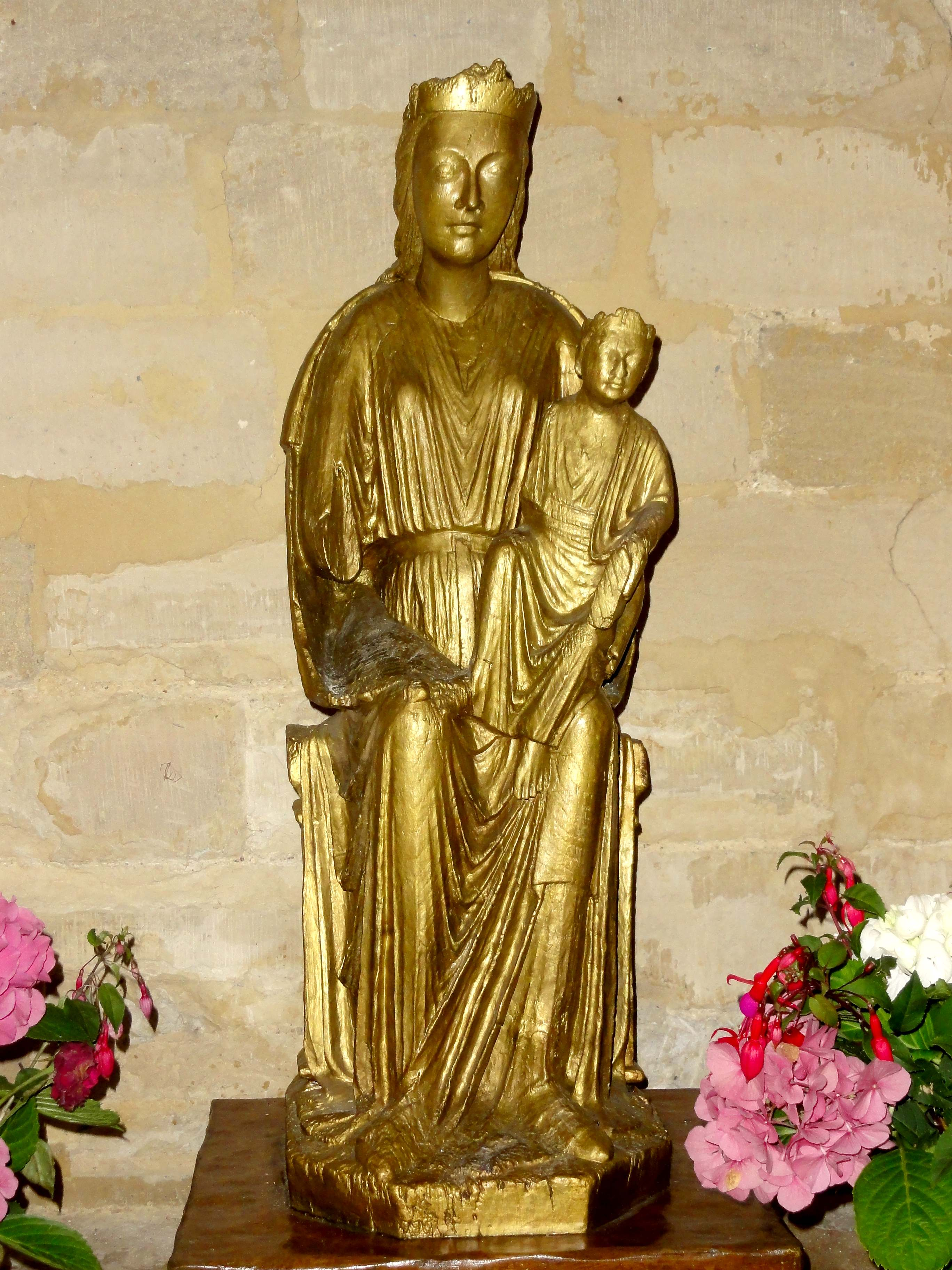 Vierge à l'Enfant, début XIIIe s. (copie).